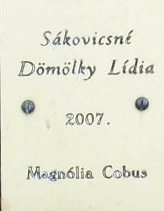 Dömölky Lídia emléktáblája, Érsekkert